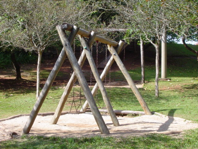 Balanço Infantil em Parque Público, Barueri SP. Swingset.